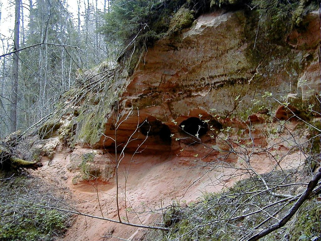 Karogu alas Staiceles apkārtnē 2002-05-01